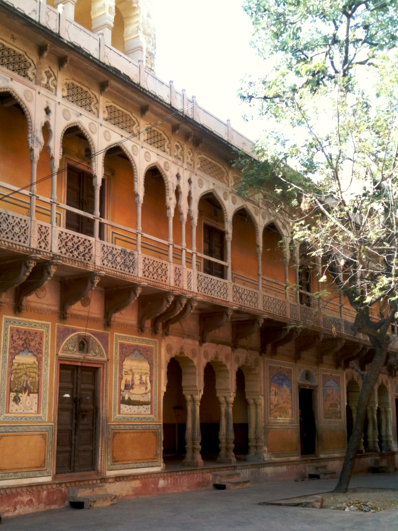 Barsana